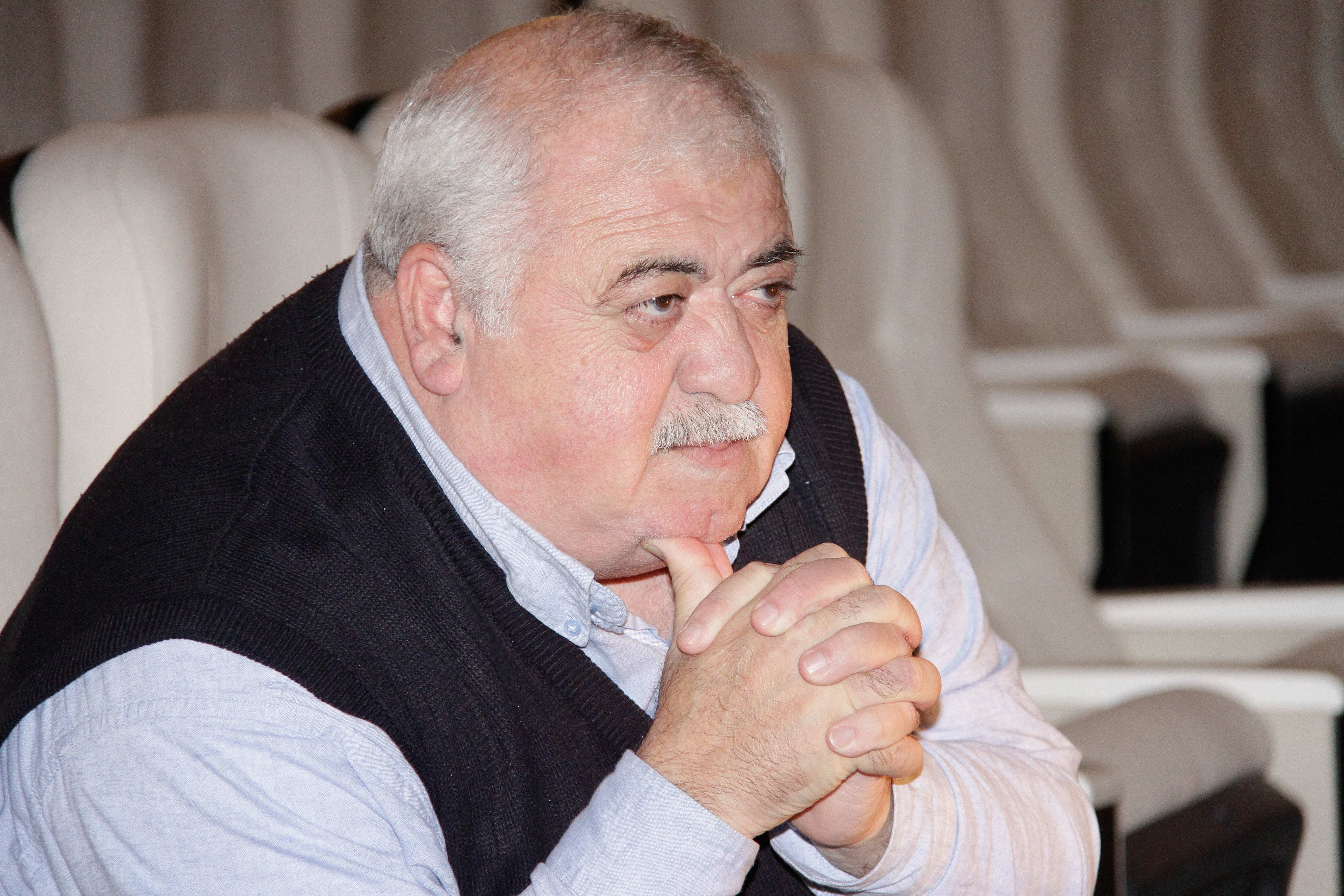 Rövşən Almuradlı